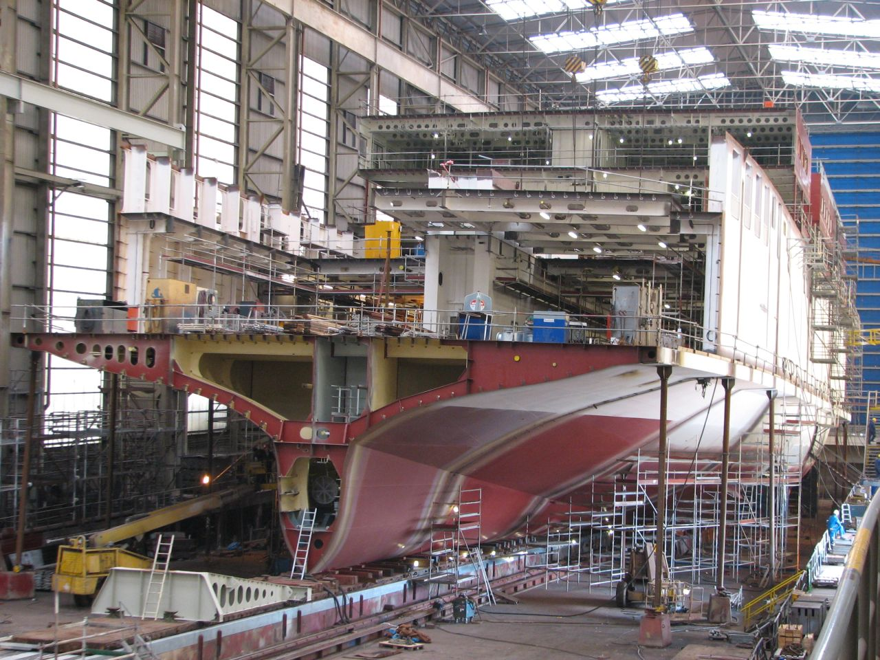 Flensburger Schiffbau Gesellschaft